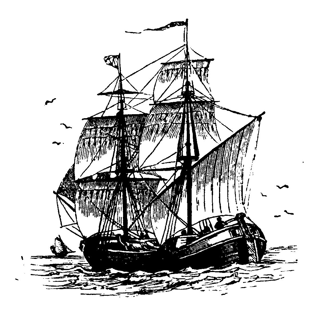 Bilander l. Billernder (fr. belandre, holl. bylander), sjöv., ett tvåmastadt fartyg, som förr begagnades till fraktfart på Nordsjökusterna.